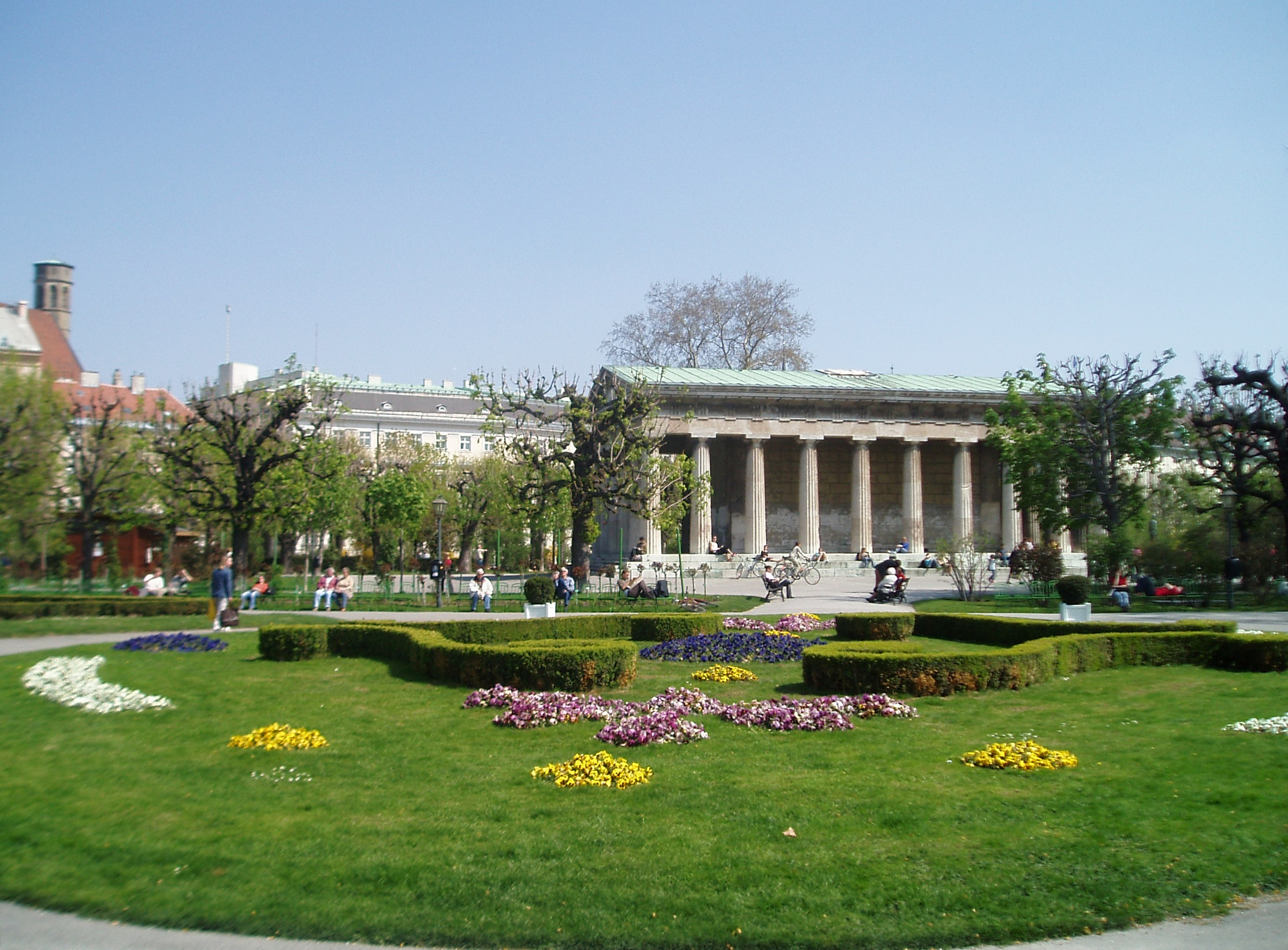 The Volksgarten (people's garden) in Vienna, Austria.